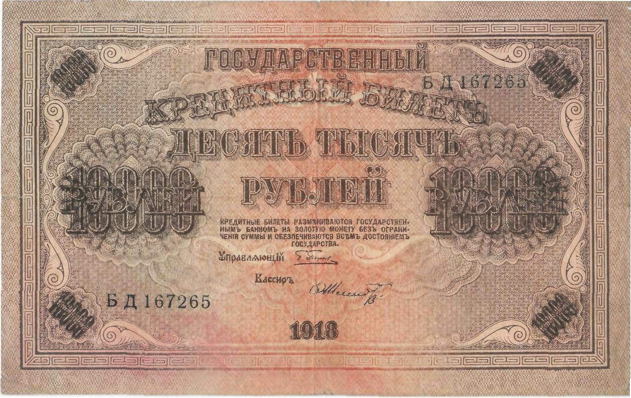 10 000 рублей несуществующего Временного правительства 1918 года. Аверс. Справа и слева под цифрами - свастики.